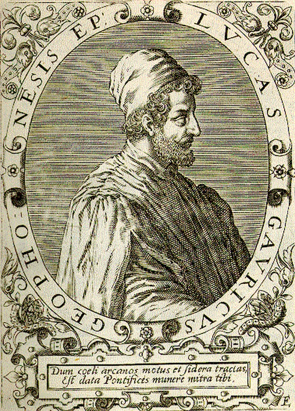 Luca Gaurico (1476-1558). (LUCAS GAURICUS GEOPHONESIS EP.[ISCOPUS])